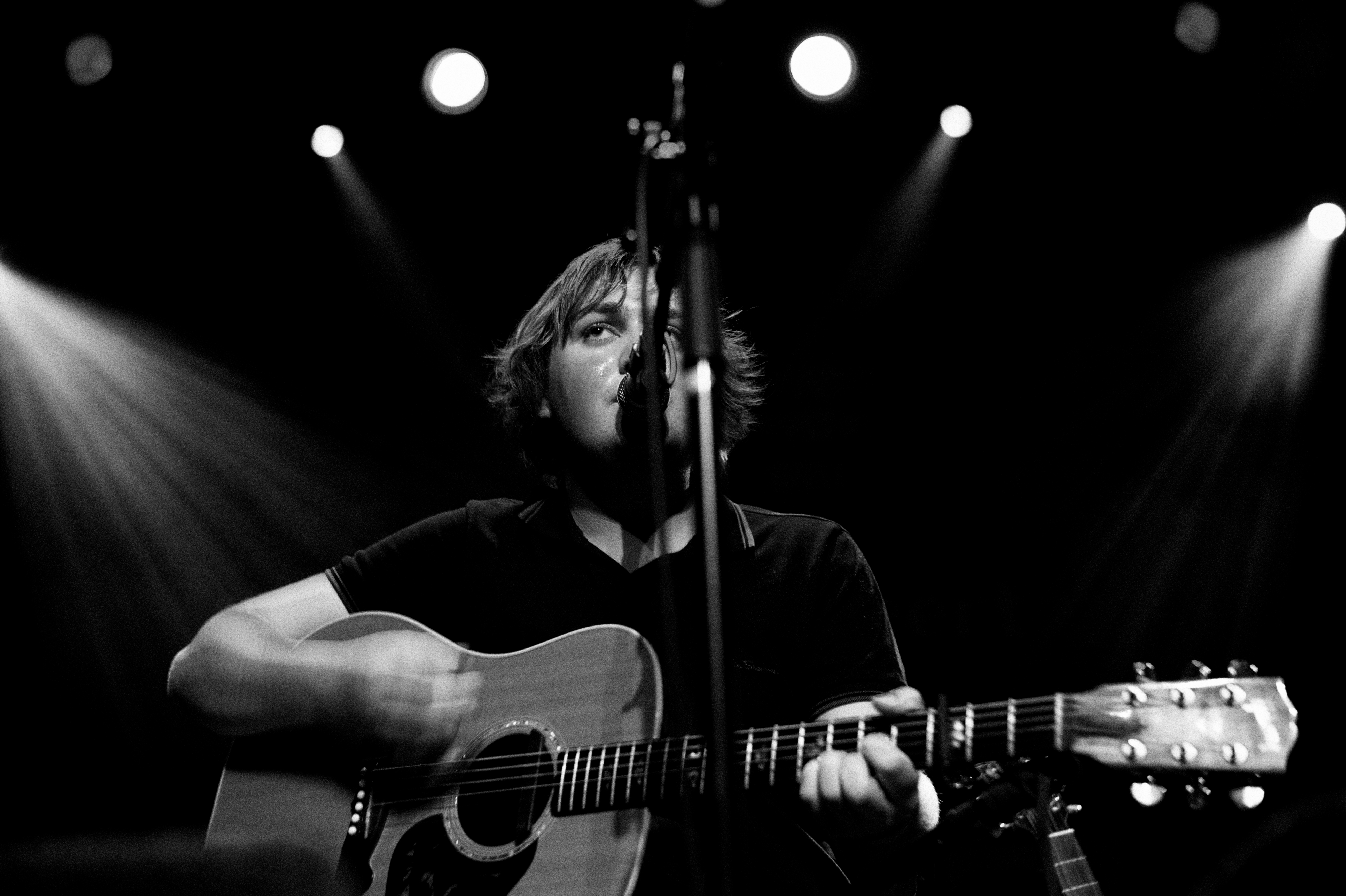 Tim Knol at 15 jaar Kink FM Crystal Ball